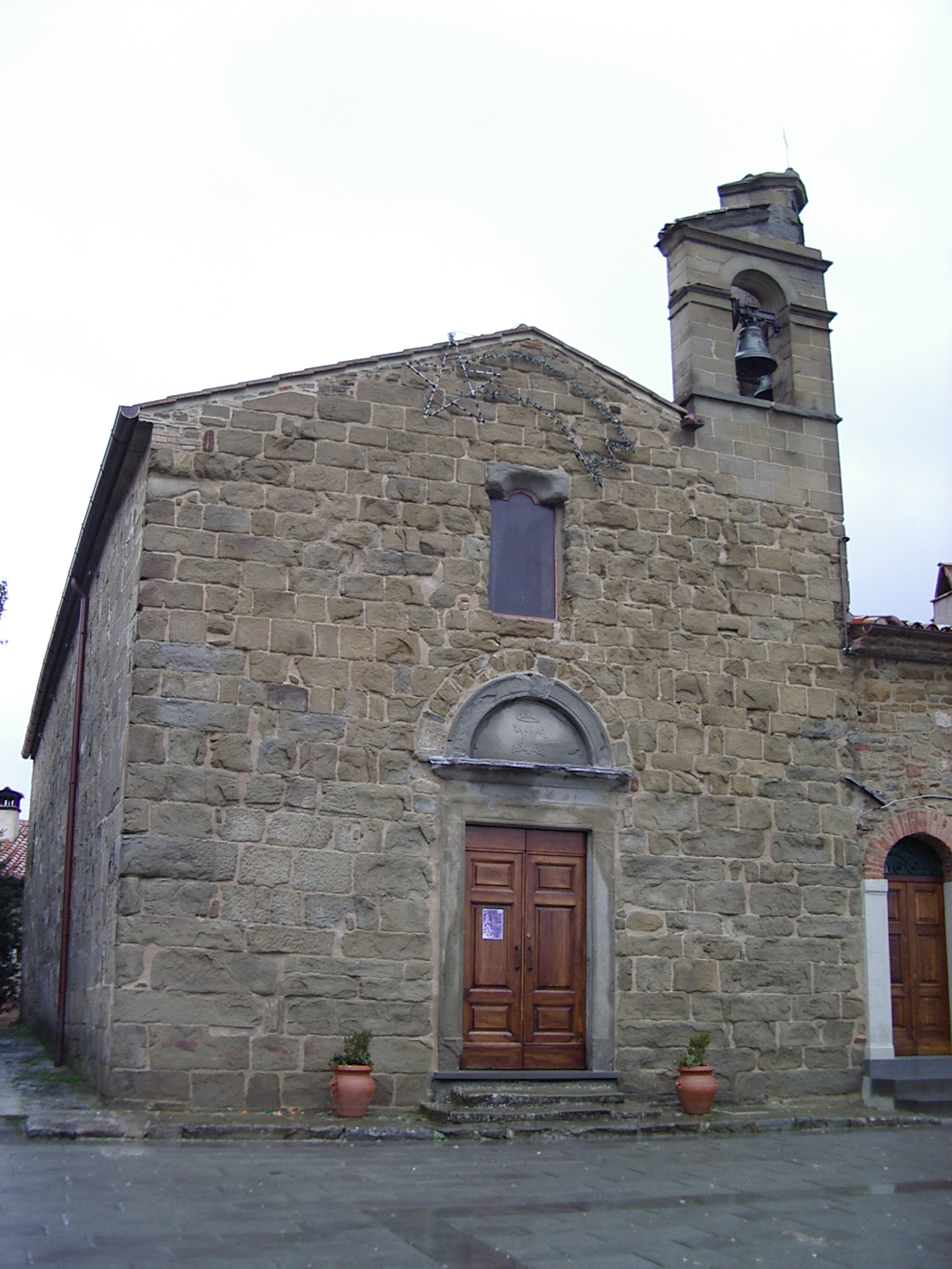 La Pieve santa Maria Assunta est une église située à Morra, une frazione de la commune de Città di Castello en Ombrie (Italie).